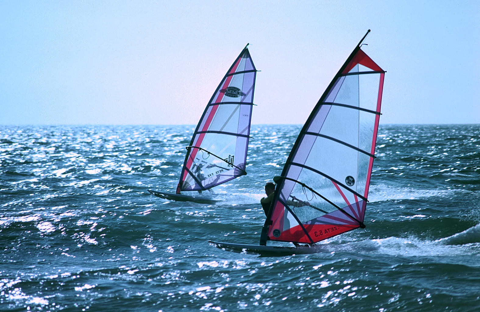 Windsurfer vor der Küste von Südwales/UK